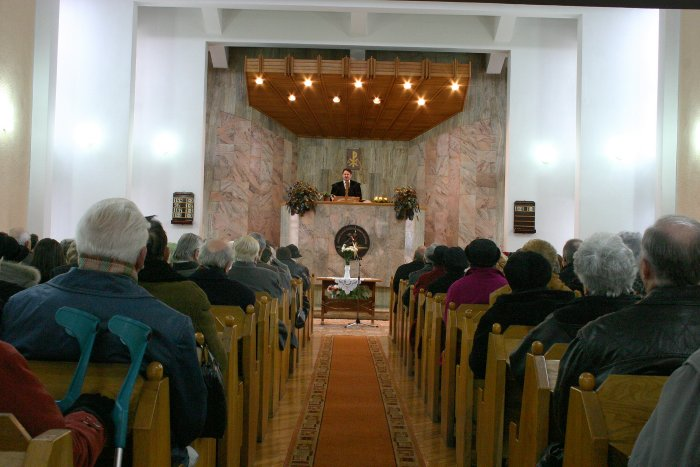 Református istentisztelet a marosvásárhelyi Alsóvárosi Református Egyházközségben.